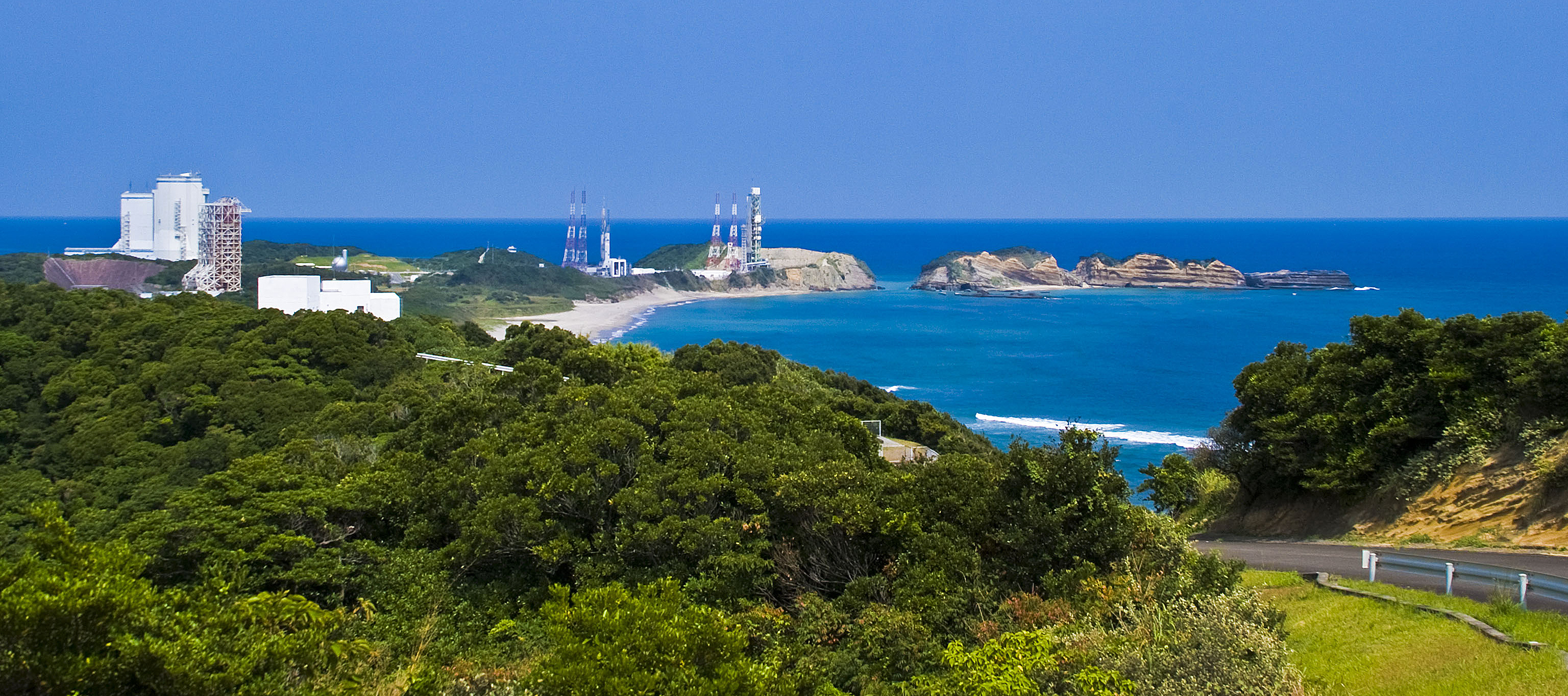 緑の山と珊瑚礁の海に囲まれた大崎射場を望む。